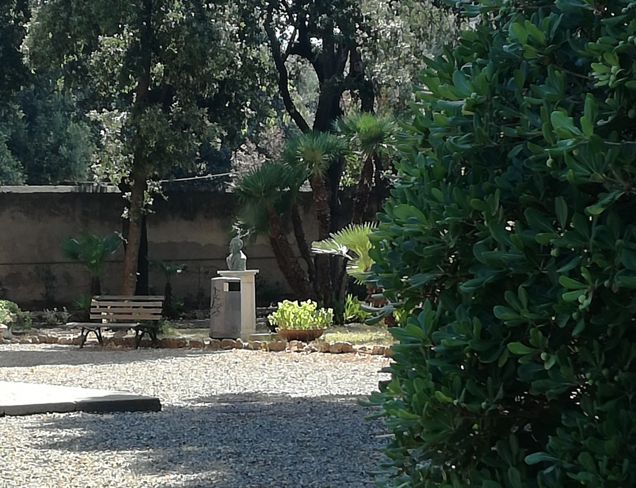 Giardino ottocentesco della Villa Trossi-Uberti ubicata ad Ardenza via Ravizza, 76